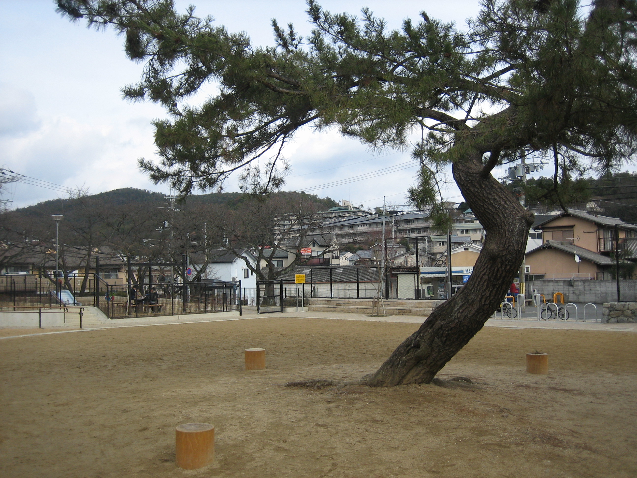 京都市北区大北山原谷乾町から原谷中央公園を撮影